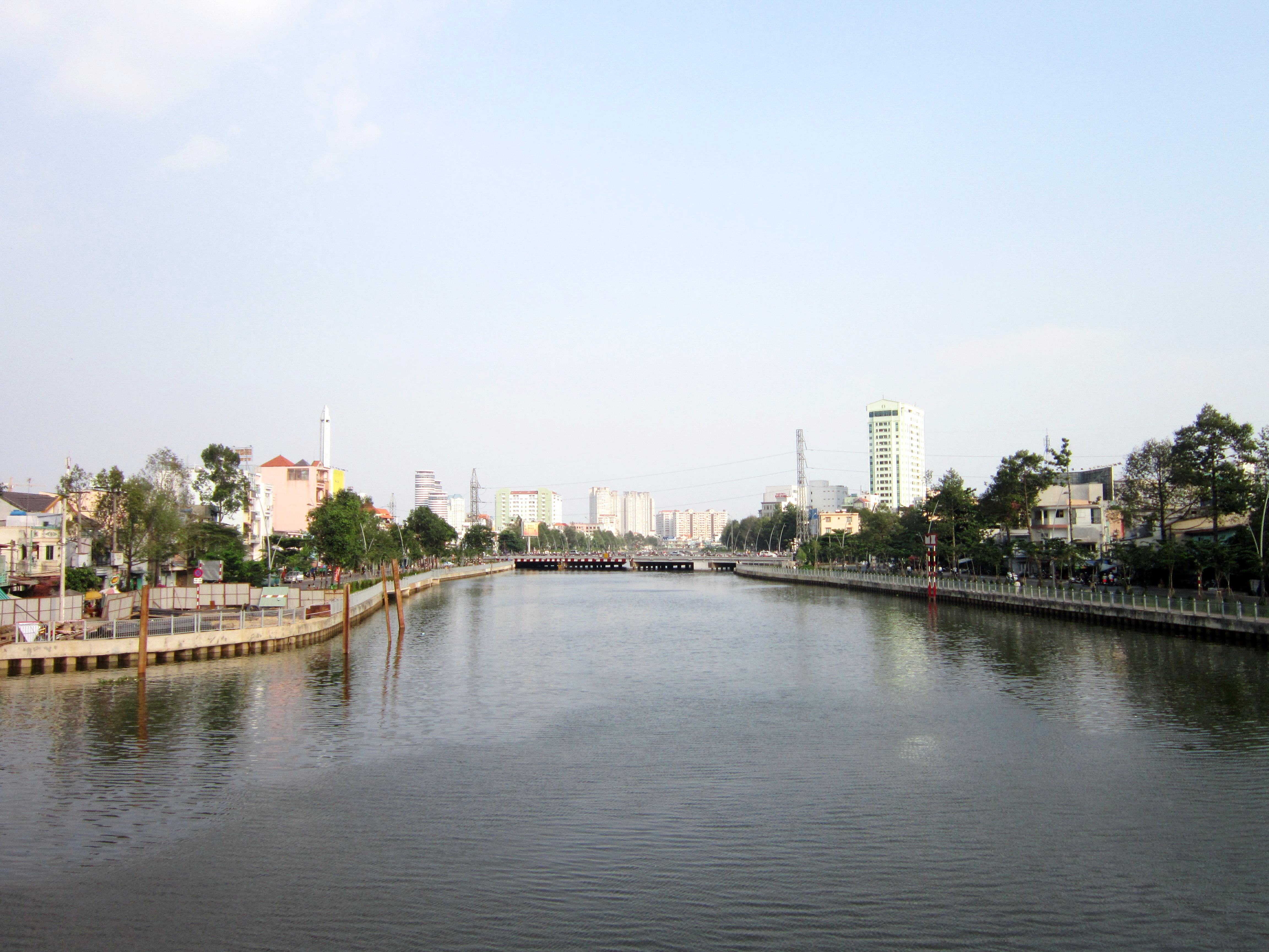 Rạch Thị Nghè, đoạn chảy qua cầu Bông. Đây là con rạch lớn chảy trên địa bàn thành phố Hồ Chí Minh (Việt Nam).